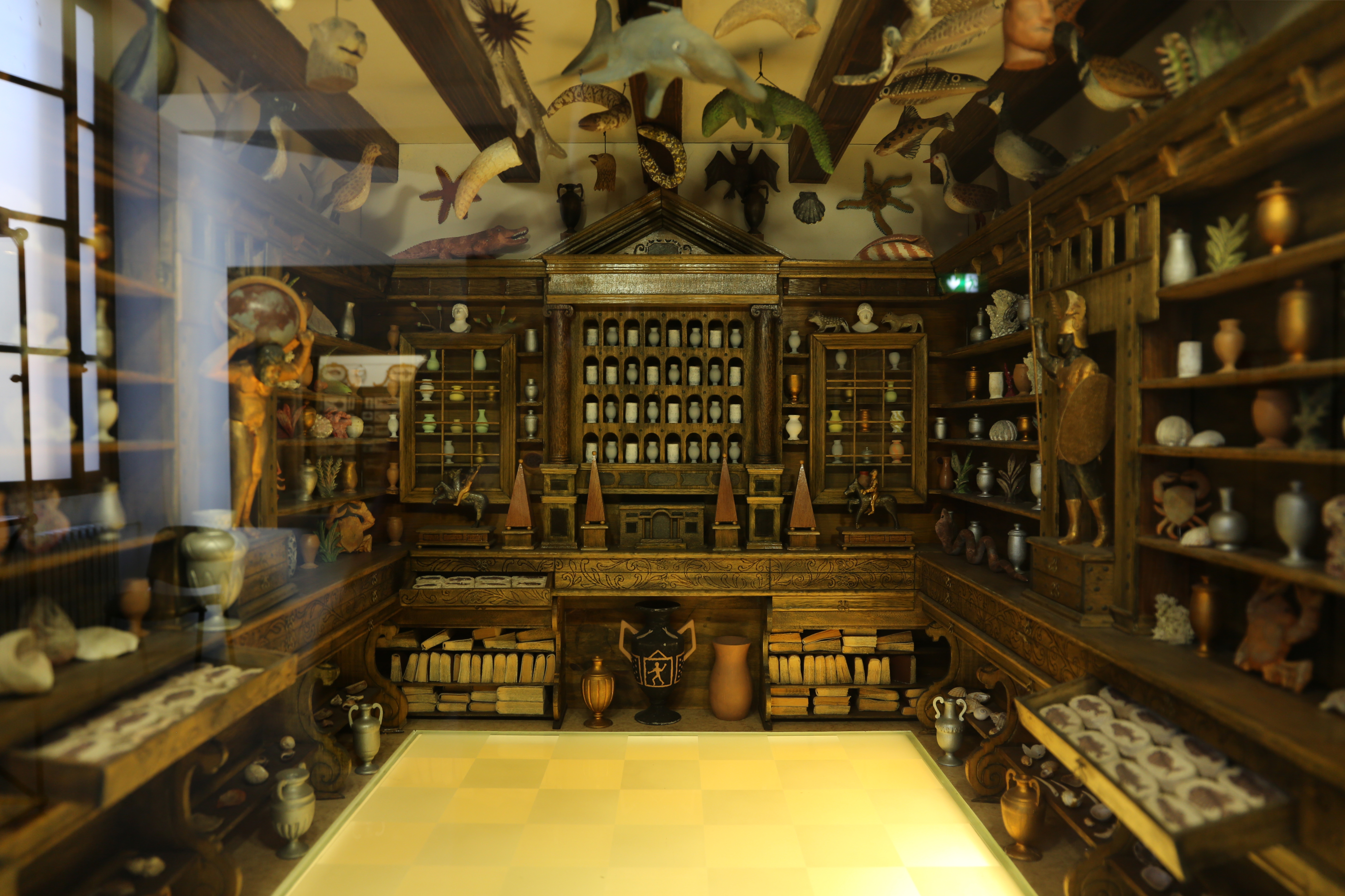 Museo civico di storia naturale di Verona This is a photo of a monument which is part of cultural heritage of Italy.